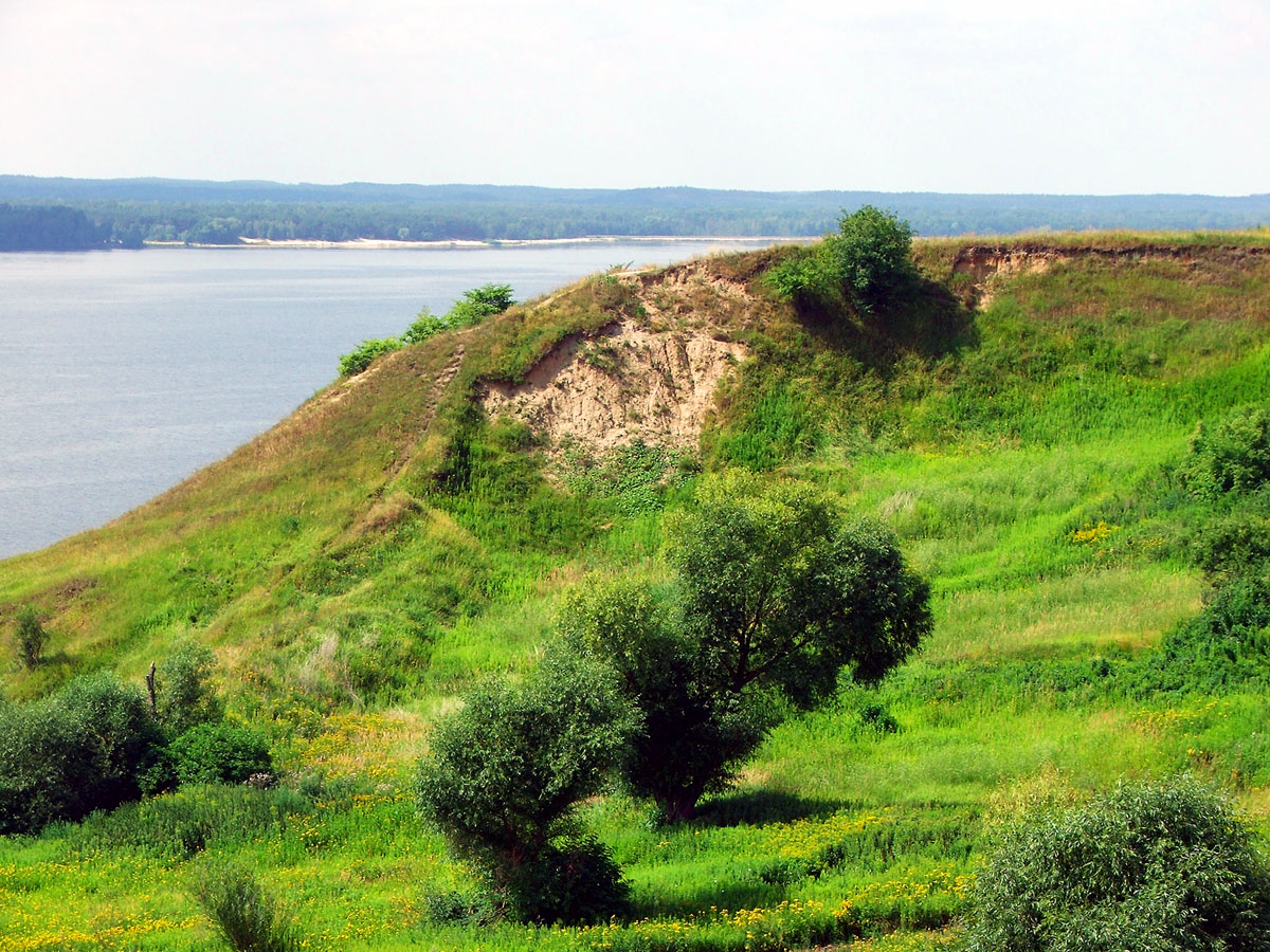 Dobrzyń n. Wisłą, Poland